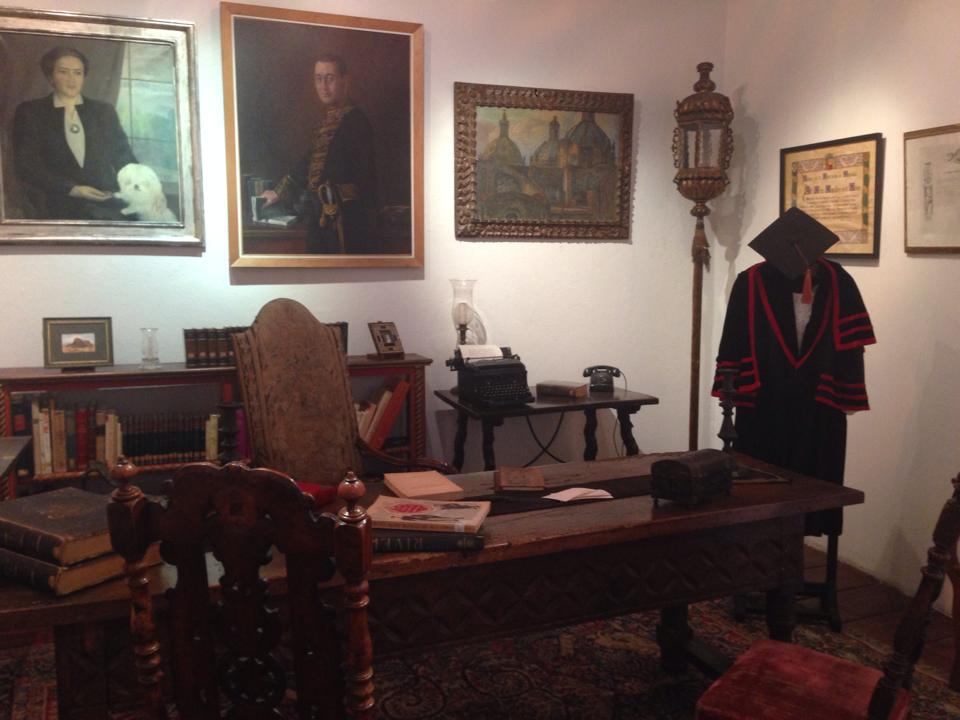 Parte del interior de casa Risco, San Ángel, CDMX